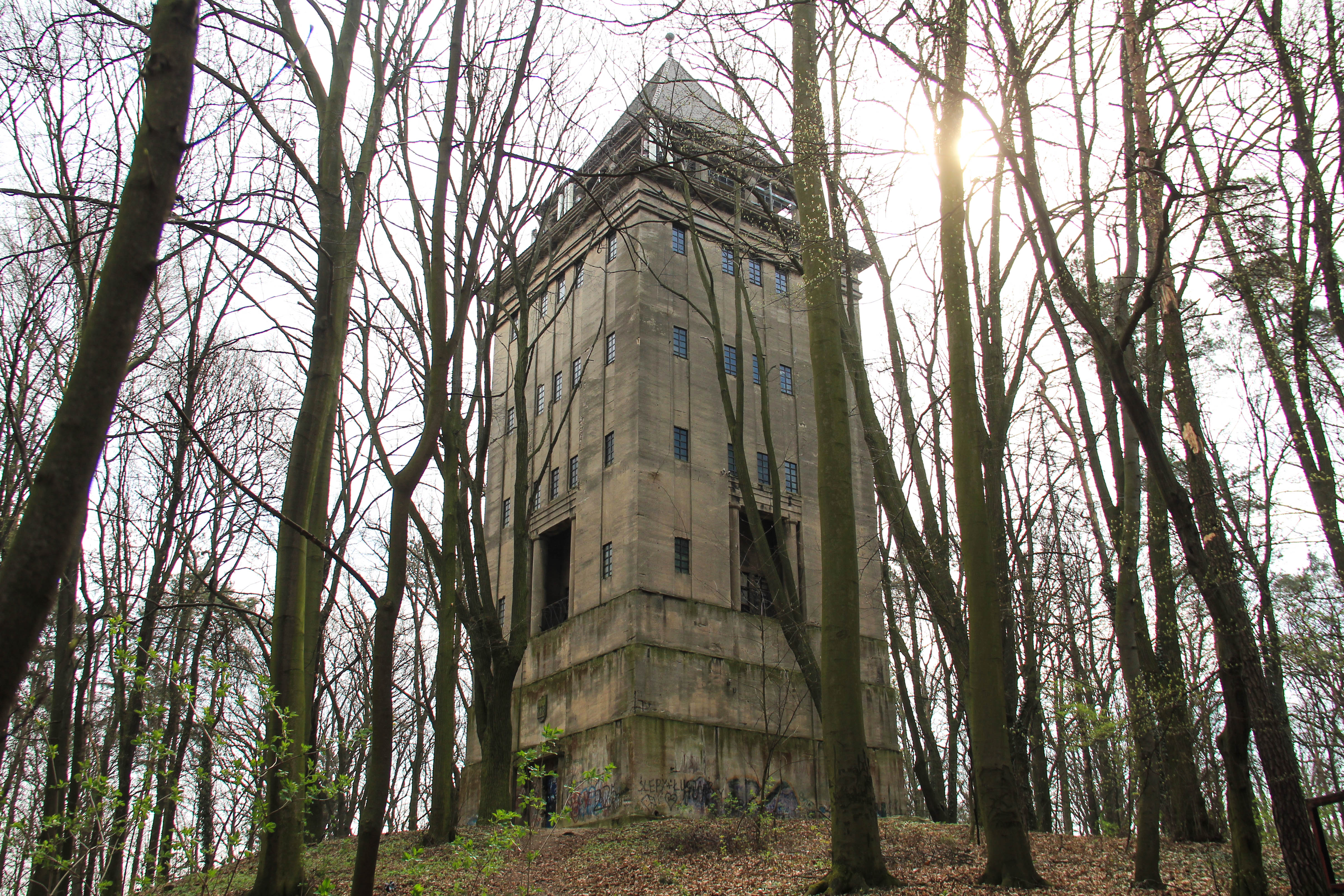 Wieża Ciśnień w Chojnowie - widok od strony północno-zachodniej